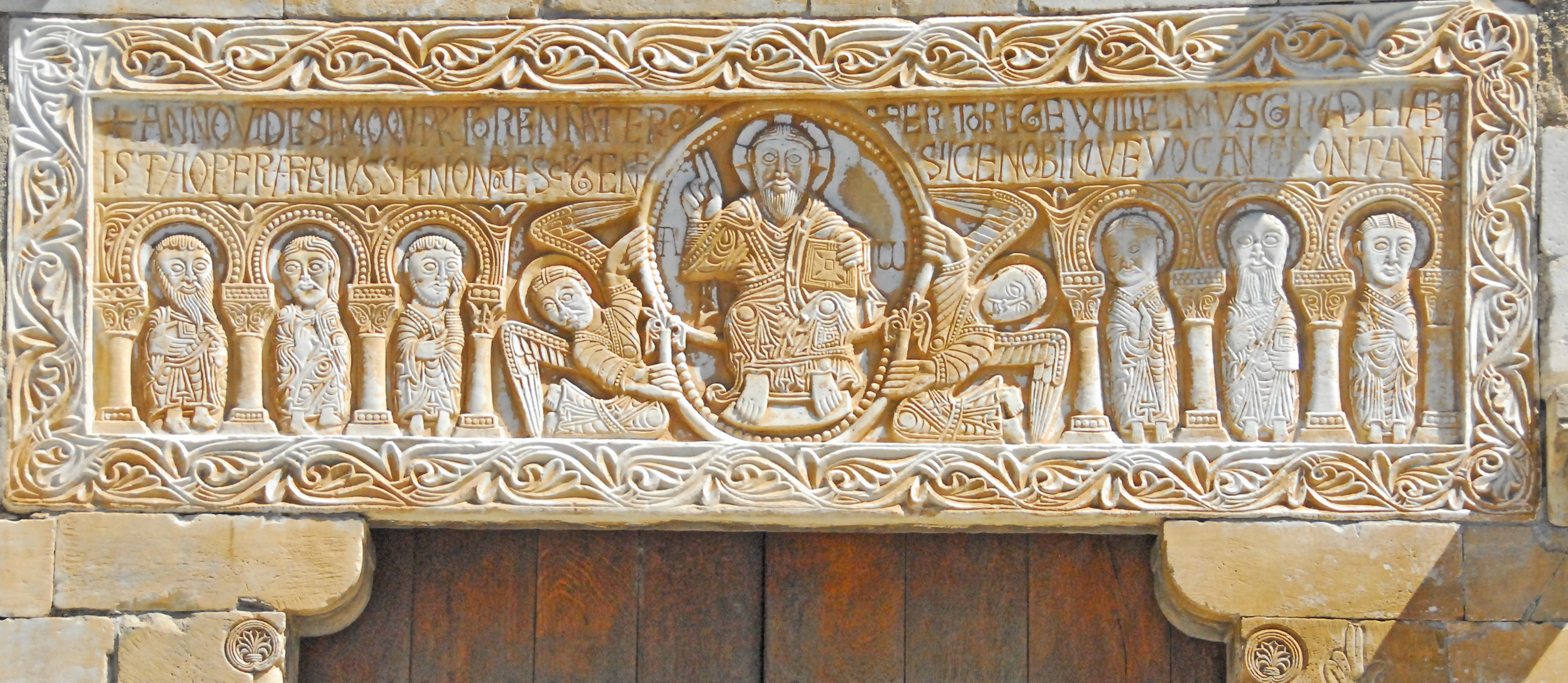 Abtei St-Génis-des-Fontaines, Portalsturz